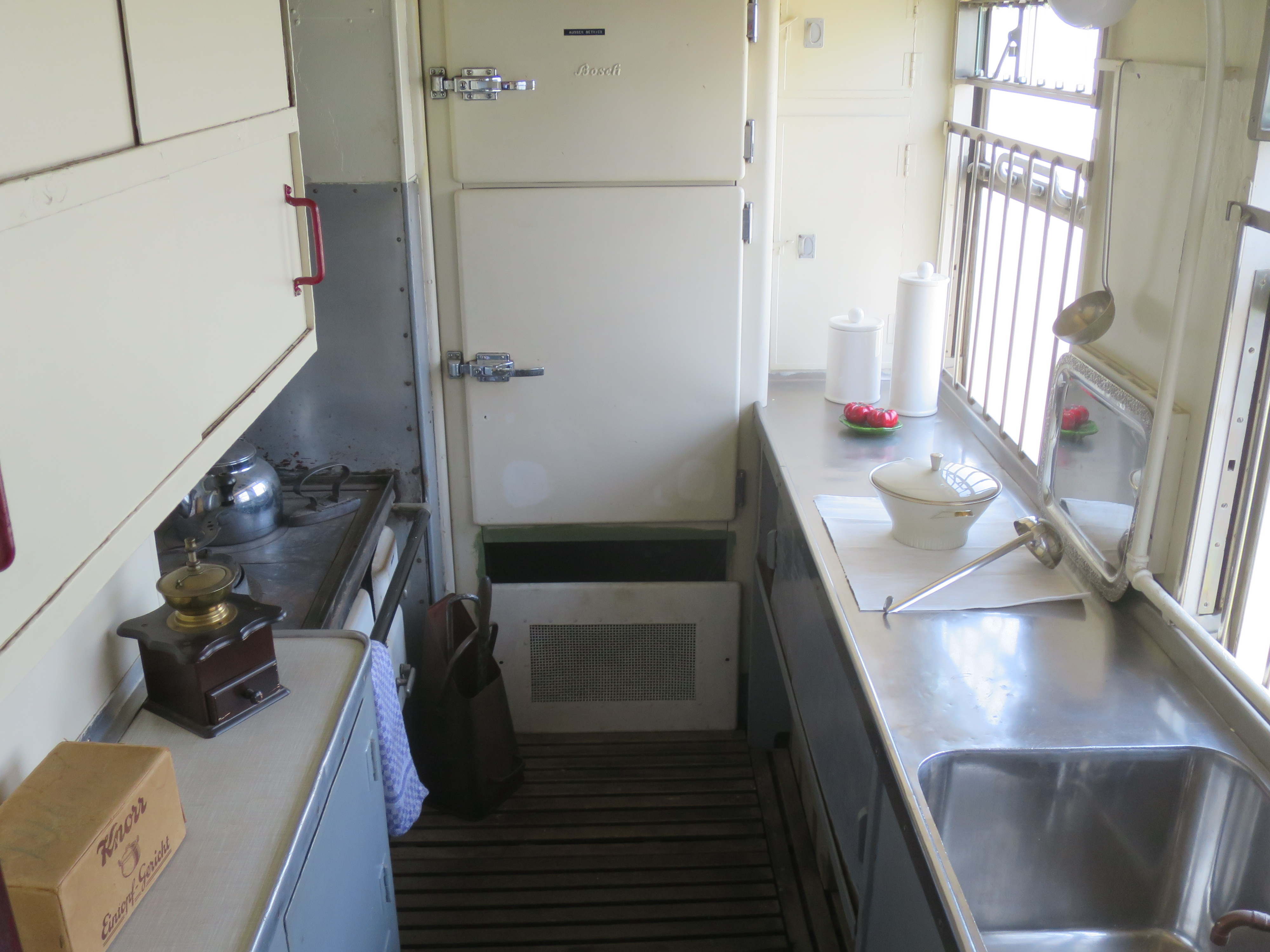 Salonspeisewagen des Sonderzuges von Hermann Göring 10 241 Bln, Küche